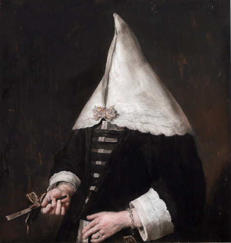 Tableau de Nicola Samori, J.V., 2009